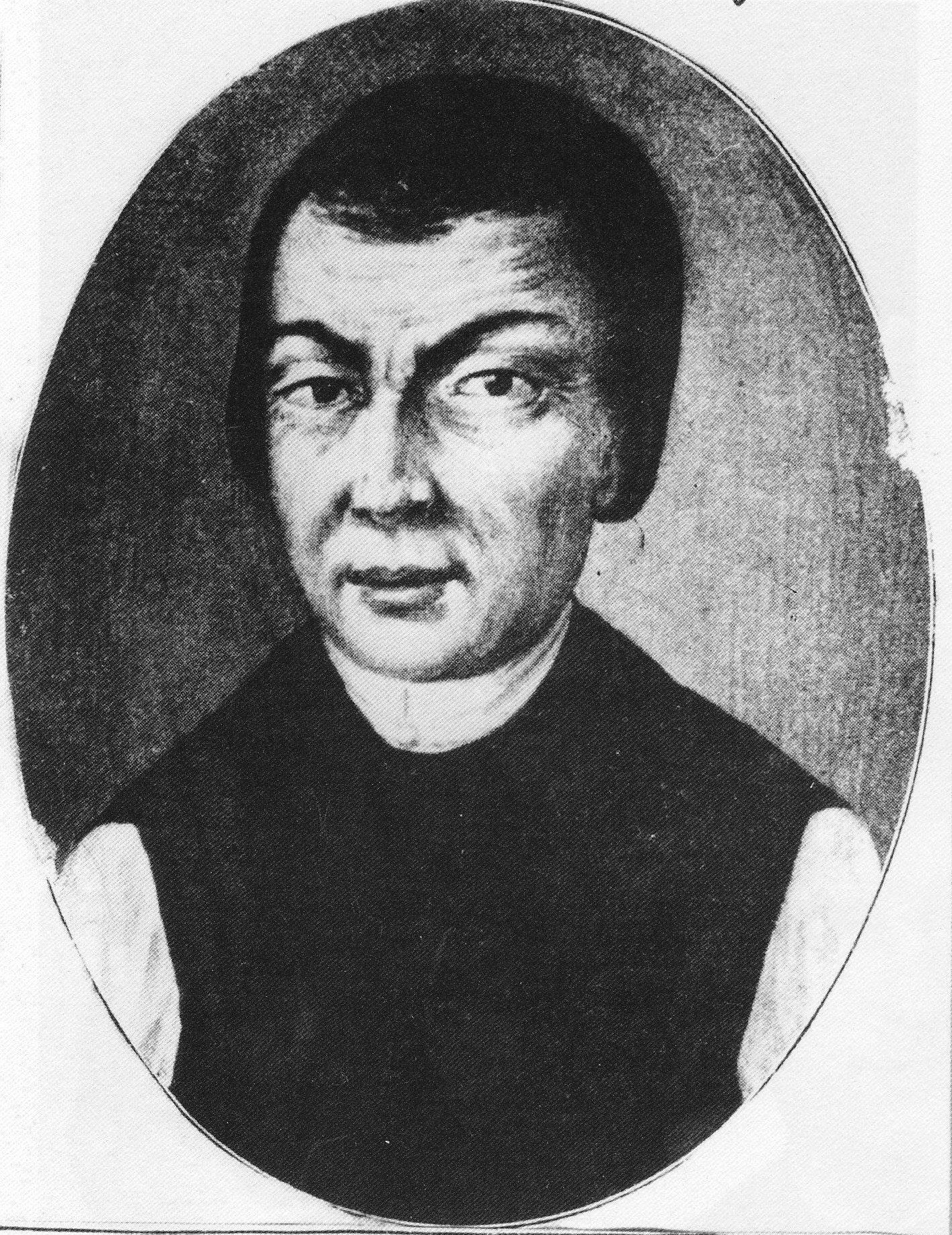 Chrysostomus Hanthaler, Lilienfelder Geschichtsschreiber, Numismatiker und Genealoge (Taufname Johannes Adam, * 14.1.1690 Ried, † 2.9.1754 Lilienfeld). Author of many books